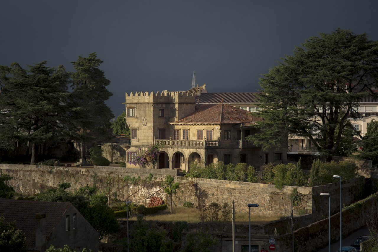 Pazo construído en 1850 siguiendo la estética de los pazos rurales. Es un edificio de dos alturas, levantado íntegramente en perpiaño granítico, que aparece dominado por una torre lateral almenada que destaca en altura de entre el conjunto de la edificación, al tiempo que añade un nuevo piso al inmueble. El cuerpo bajo presenta un corredor asoportado bajo arcos de medio punto, que da lugar a una hermosa balconada superior, con balaustrada de piedra, y vistas sobre la ría. El inmueble es una síntesis de referentes barrocos y medievales. Destaca el diseño del extraordinario balcón circular que se abre en el chaflán de la torre. La protección patrimonial de Casa Durán abarca toda la parcela incluidos los magníficos los jardines del inmueble, de casi 4.000 metros cuadrados. Un aspecto que aporta gran singularidad al Pazo Montecelo es que se encuentra en pleno casco urbano de la ciudad, a escasos metros de la avenida García Barbón, y con incomparables vistas la Ría de Vigo y las Cies. Fuente: Faro de Vigo